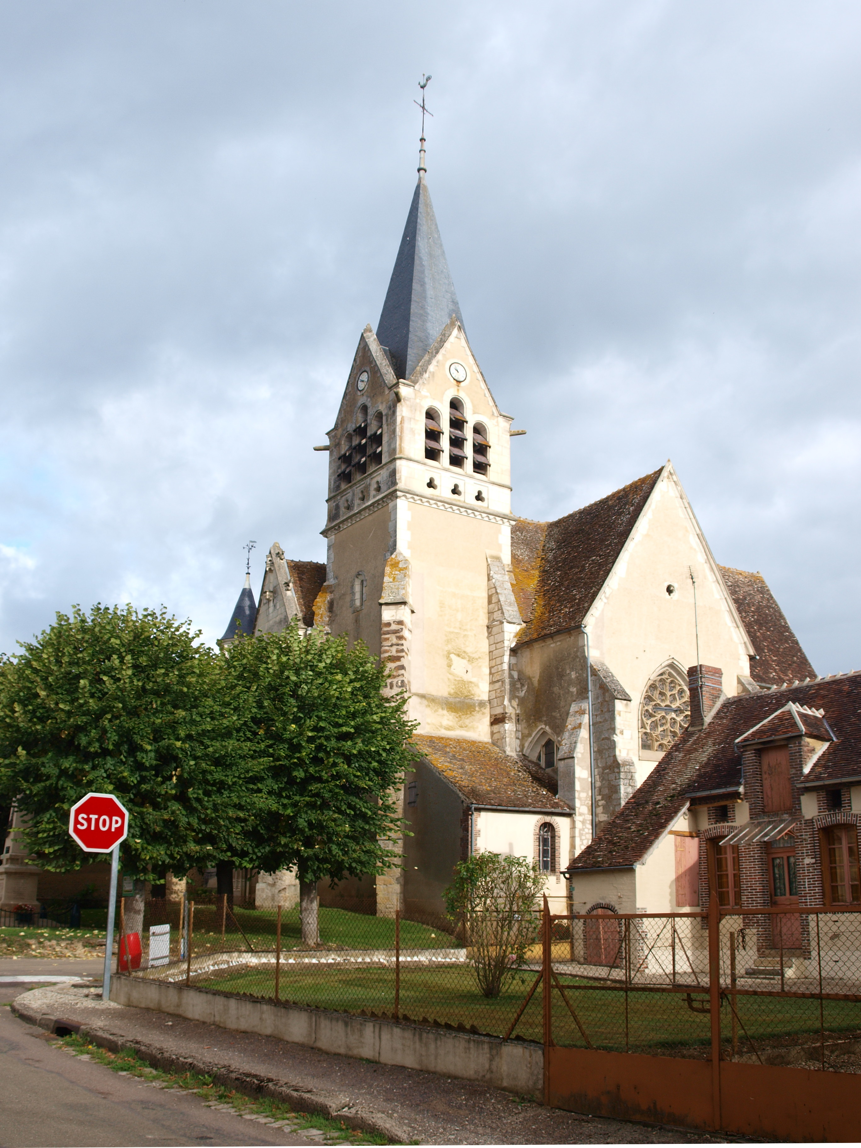 Villiers-sur-Tholon (Yonne, France)